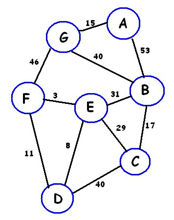 Srpski (latinica): Tezinski graf